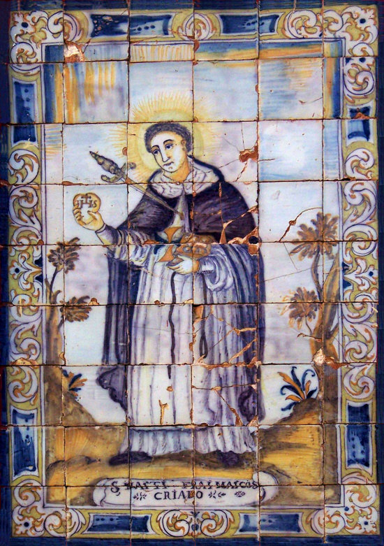 Autor anónimo. Fábrica: ---------- Fecha: Siglo XVII. Beato Marcos Criado, fraile trinitario. Retablo cerámico del s. XVII. Fachada del Santuario de María Auxiliadora. Ronda de Capuchinos. Sevilla.